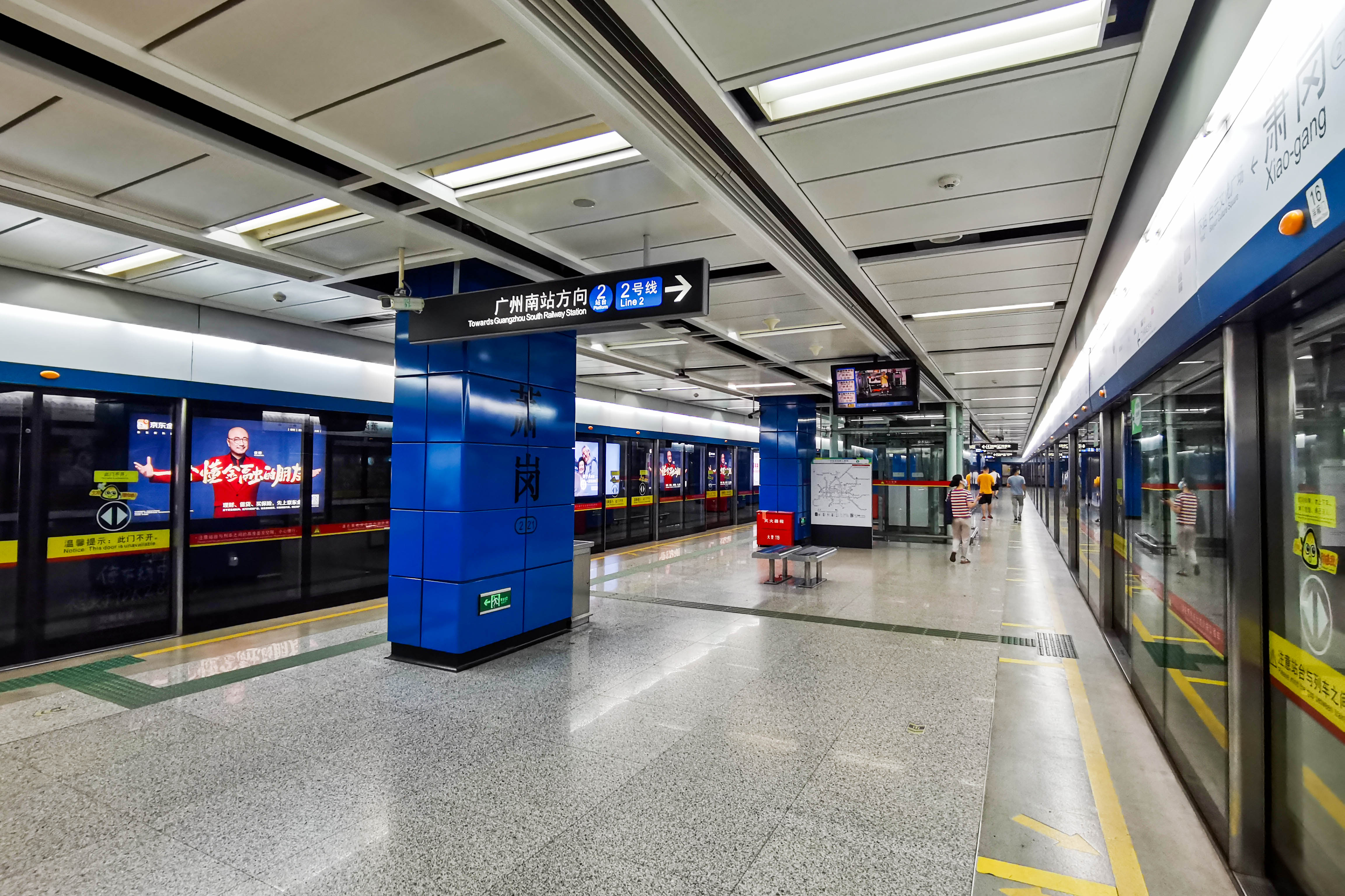 广州地铁萧岗站